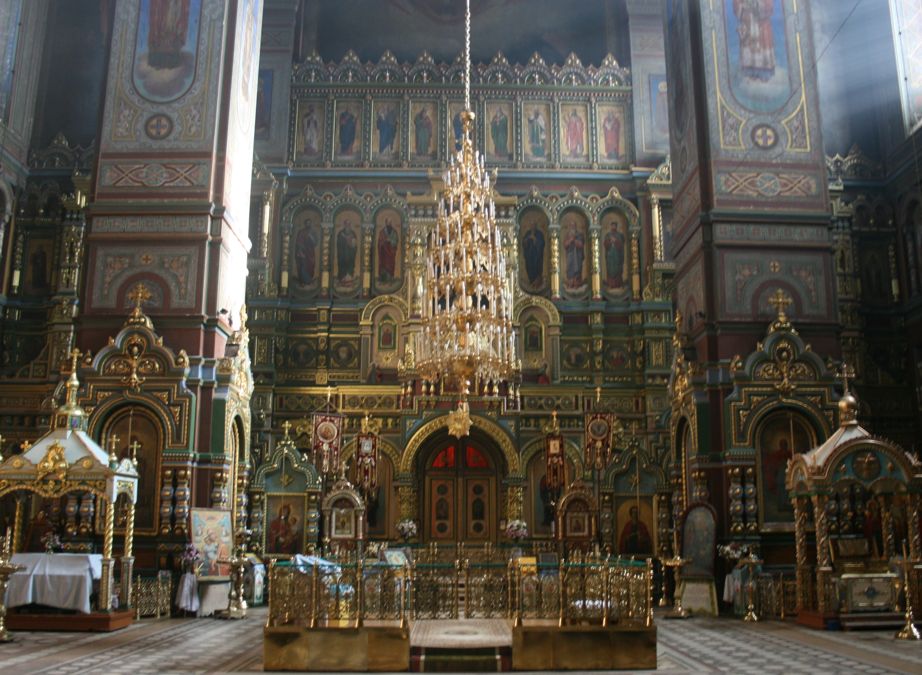 Ансамбль Вознесенского собора (Липецкая область, Елец, Красная площадь)